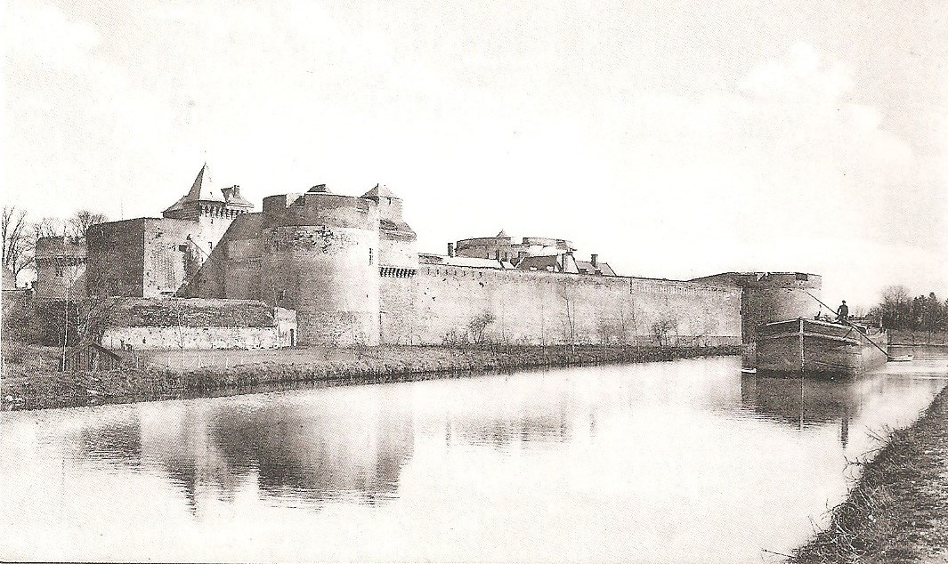 Château de Ham (Somme), avant 1917 (1)